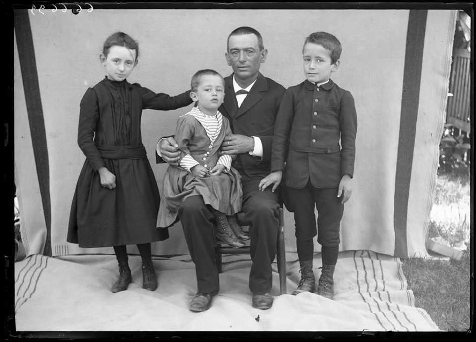 Reproduction numérique d'une épreuve photographique, réalisée par Félix Arnaudin, sur plaque de verre, selon la technique du négatif, 13x18cm